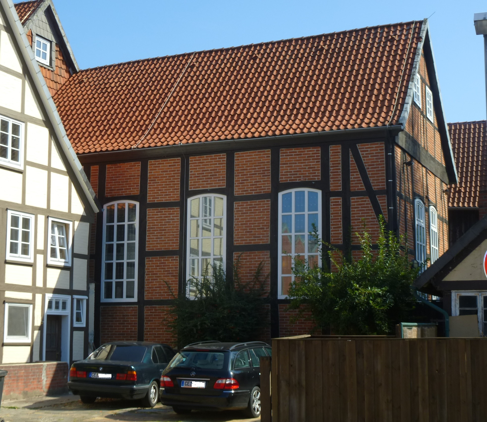 Celle, Fachwerksynagoge (Im Kreise 24) im rückwärtigen Grundstücksbereich. Hier Block von der Wehlstraße aus.